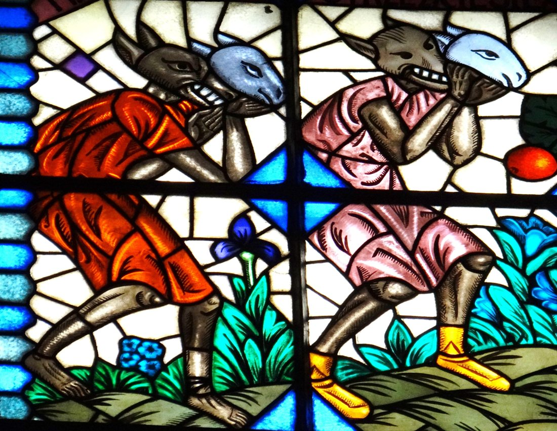 Kwatera witraża z kościoła pw. św. Antoniego w Częstochowa przedstawiająca "Fałszywych proroków", zaprojektowana przez Zofię Baudouin de Courtenay, wykonana pomiędzy 1959-1965 przez Zakład Witrażowniczy Stefana Nawrockiego w Częstochowie